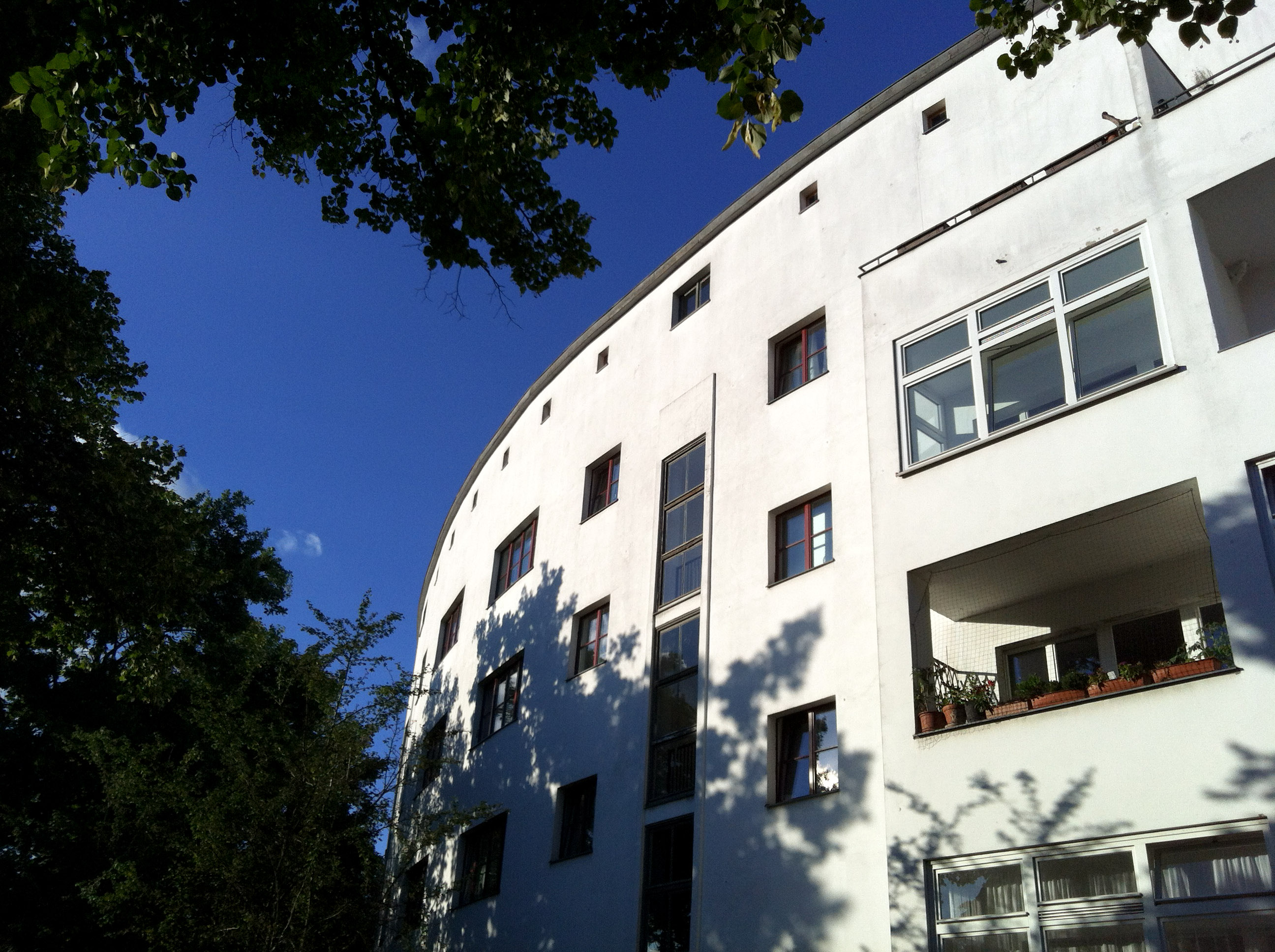 Wohnanlage von Paul Rudolf Henning in Berlin-Baumschulenweg, Baumschulenstraße/Köpenicker Landstraße/Neue Krugallee/Rodelbergweg, erbaut 1929/1930. Bauherr: Gemeinnützige Baugesellschaft Berlin-Ost mbH 8″ N, 13° 29′ 31.8″ E